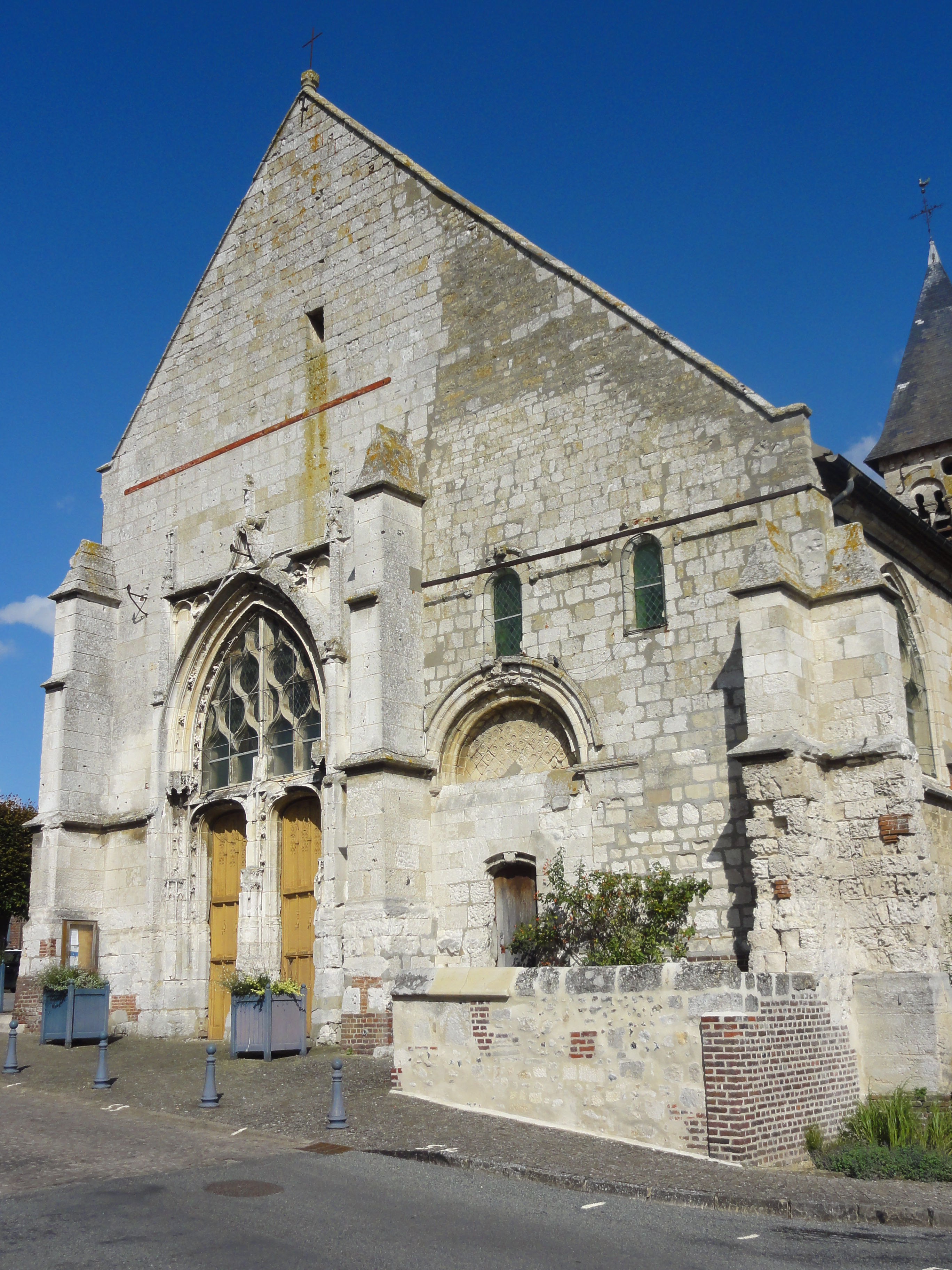 Église Notre-Dame de l'Annonciation - voir titre.